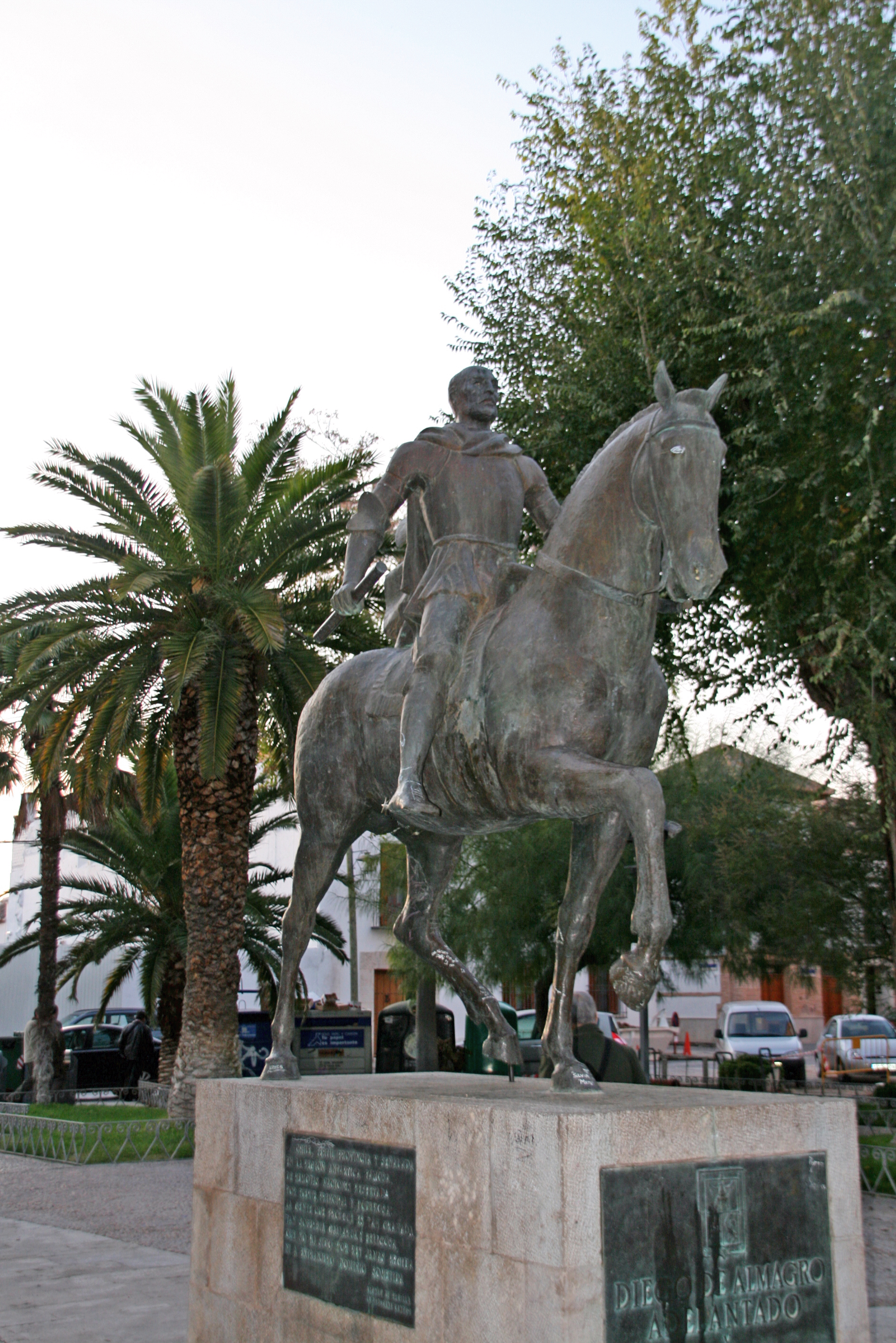 Estatua de Diego de Almagro en la plaza mayor de su localidad natal